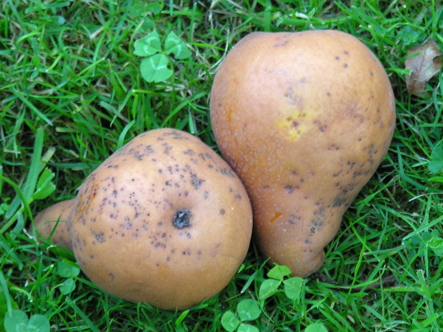 Peras en Bastavales, Brión